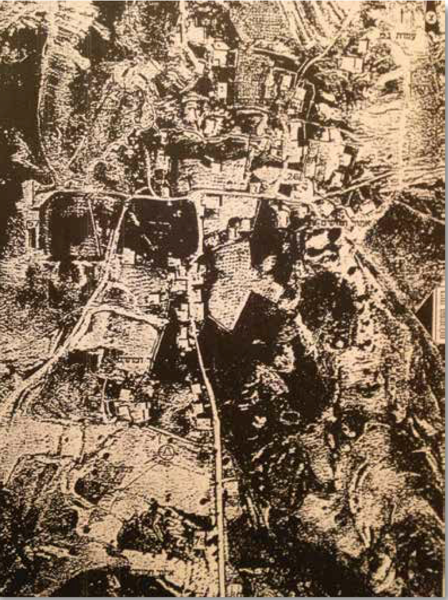 מבצע חוק וסדר. תצ"א של הכפר מידון.